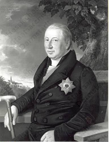 Wilhelm Fürst zu Solms-Braunfels (1759-1837) / Porträt, vor Landschaftshintergrund vor Schloss Braunfels sitzend, Halbfigur